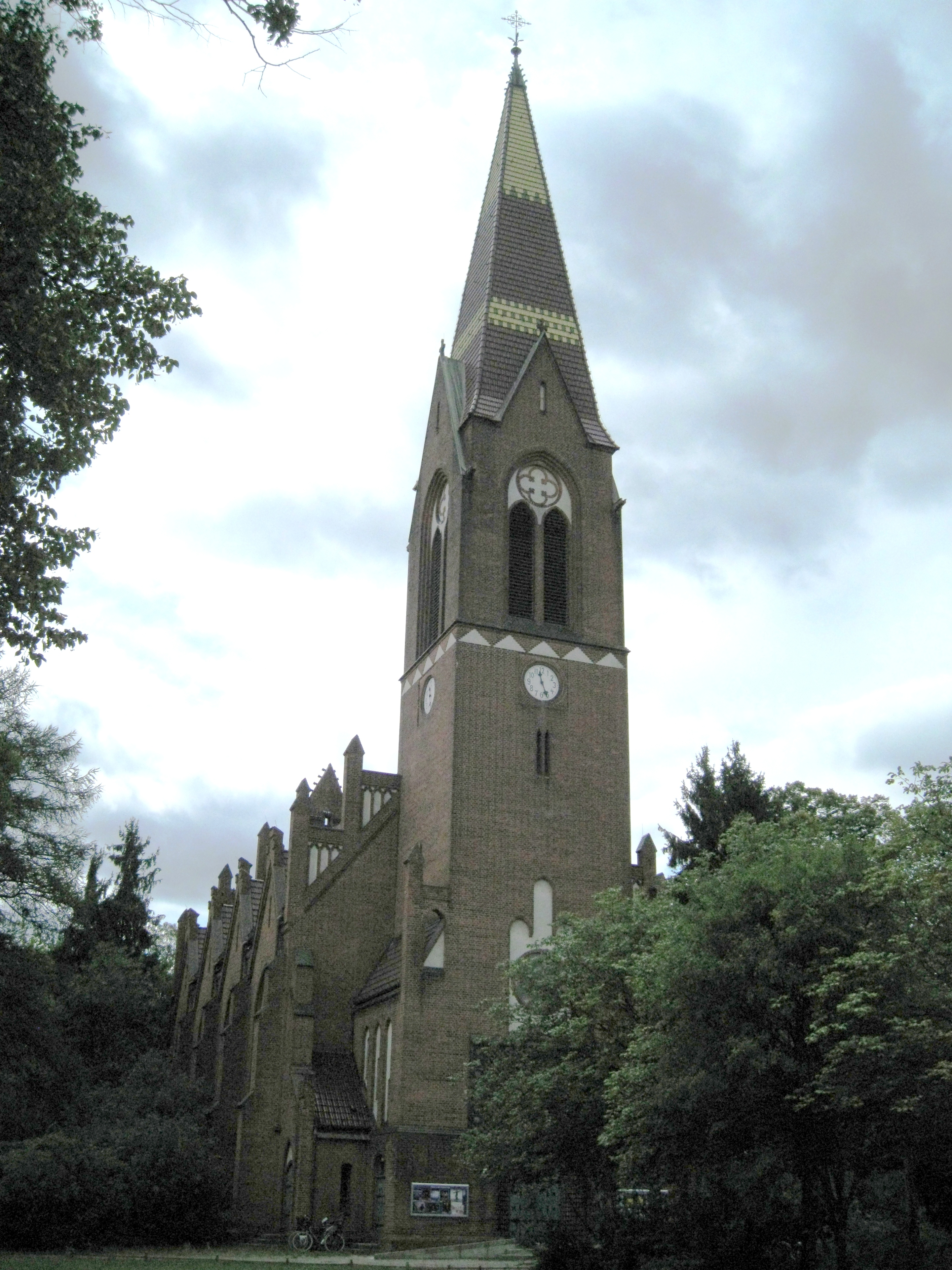 Petruskirche am Oberhofer Platz in Berlin-Lichterfelde